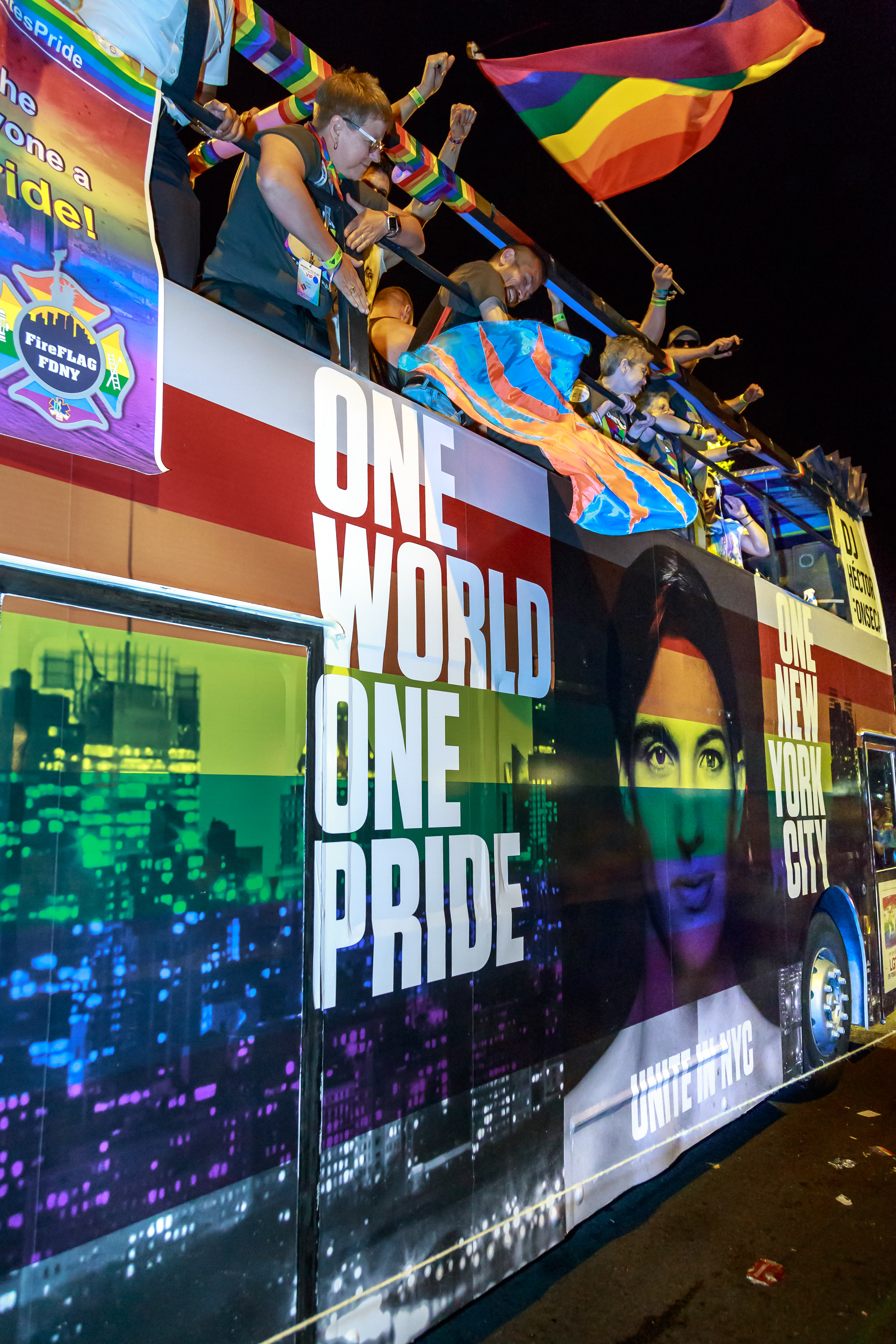 World Pride NYC 2019. Manifestación WorldPride 2017. Madrid.